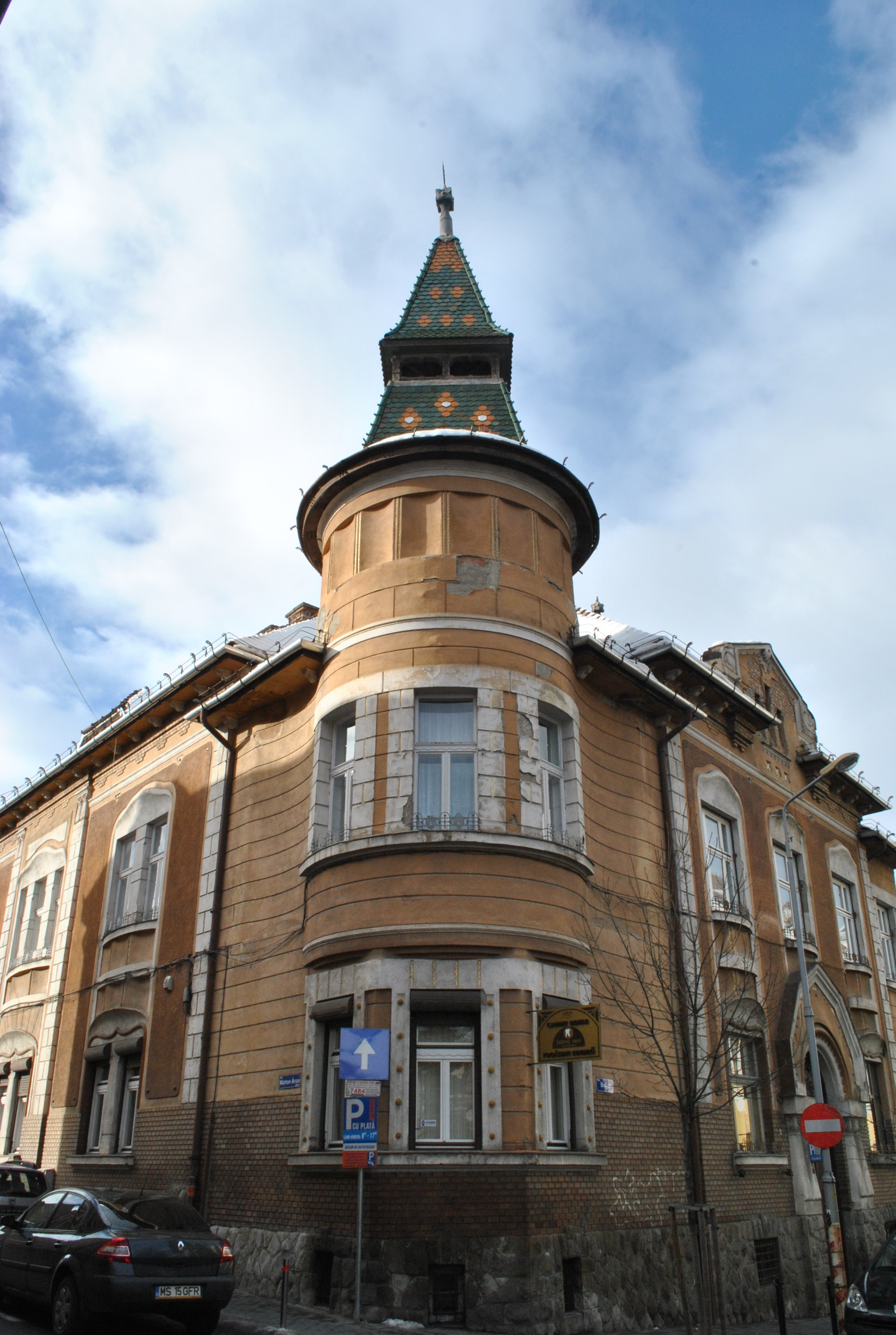 Ansamblul urban "Piața Bolyai"